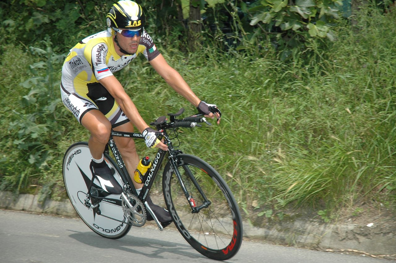 Ricardo Serrano, Euskal Bizikleta 2007